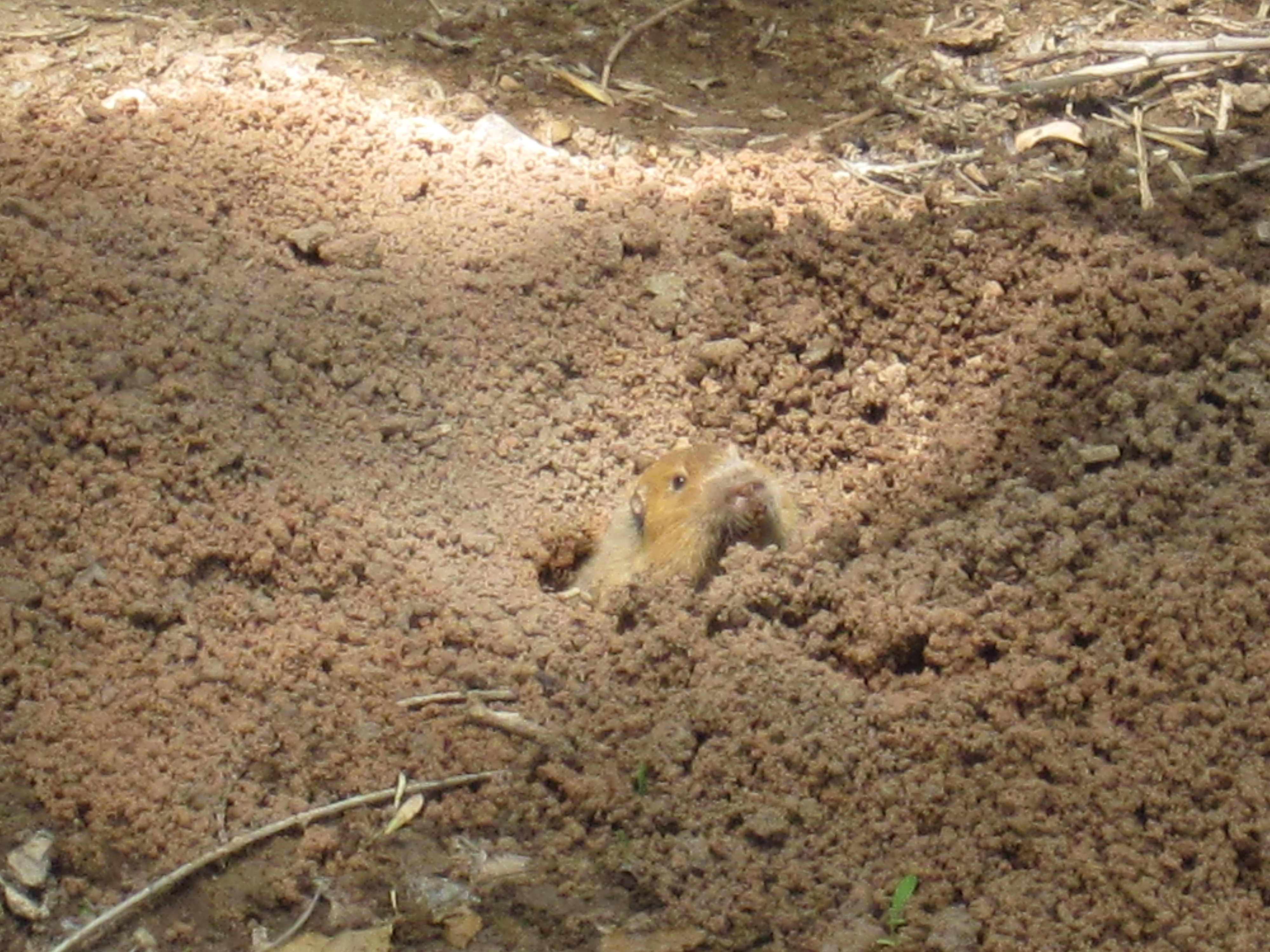 Taschenratte der Gattung Thomomys sp. im Zion National Park in den Vereinigten Staaten.